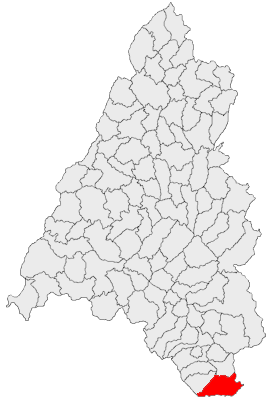 Categorie:Hărţi ale judeţului Bihor